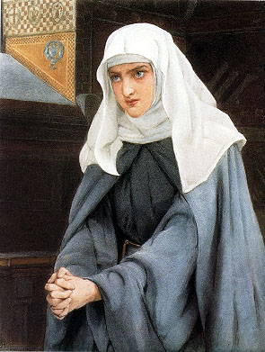 Isabella